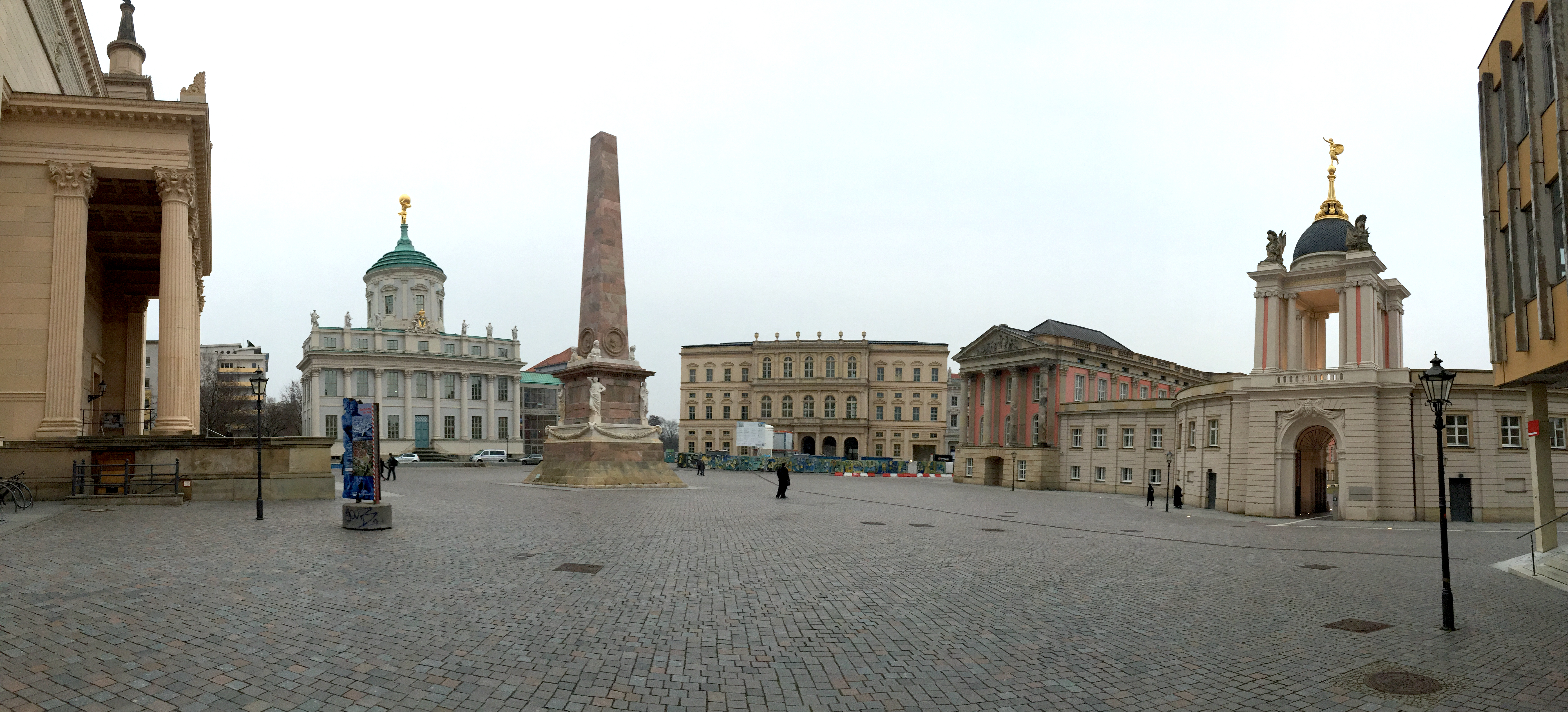 Der Alte Markt in Potsdam im März 2016